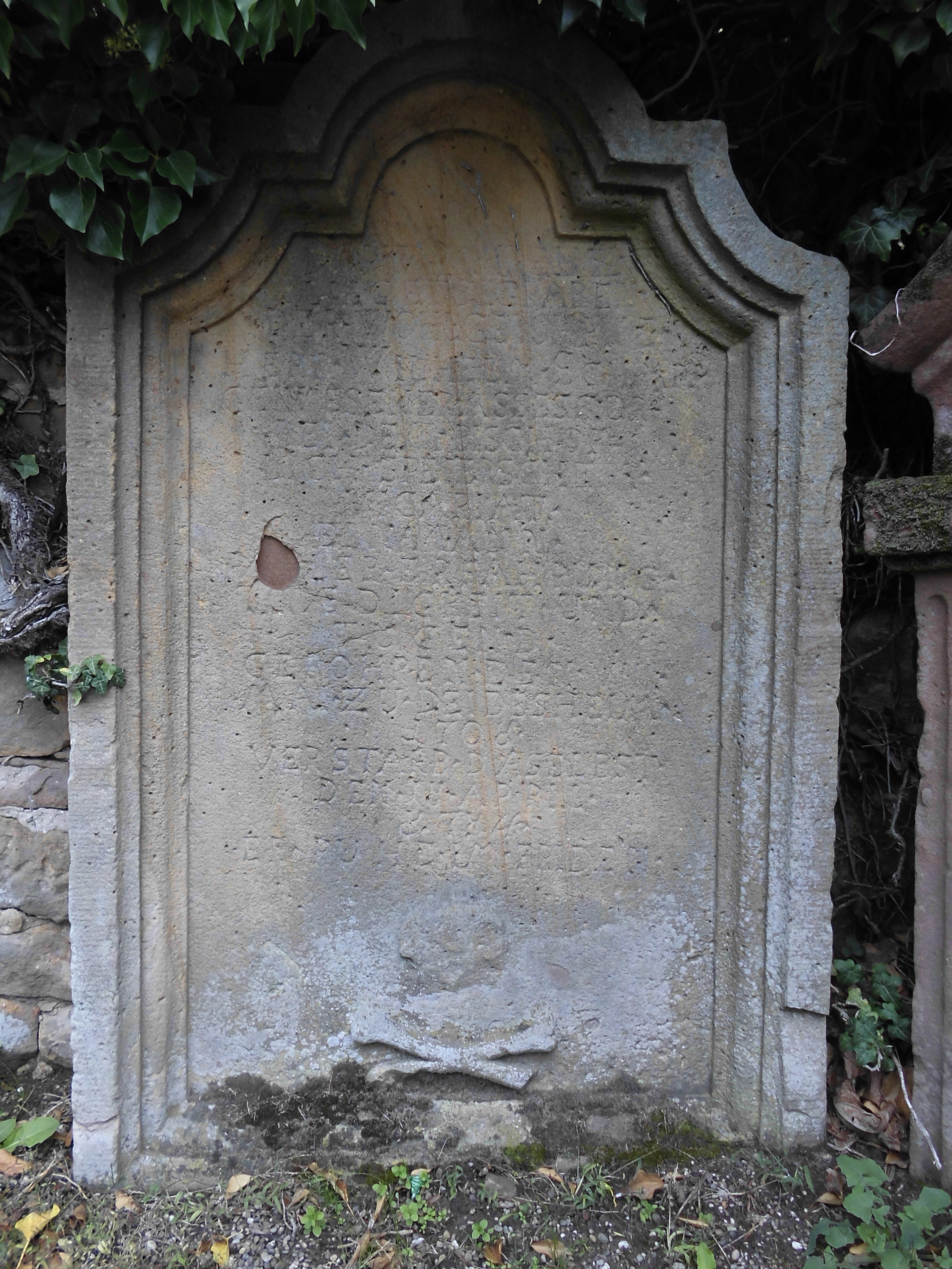 Grabstein Schmit, Friedhof Deidesheim